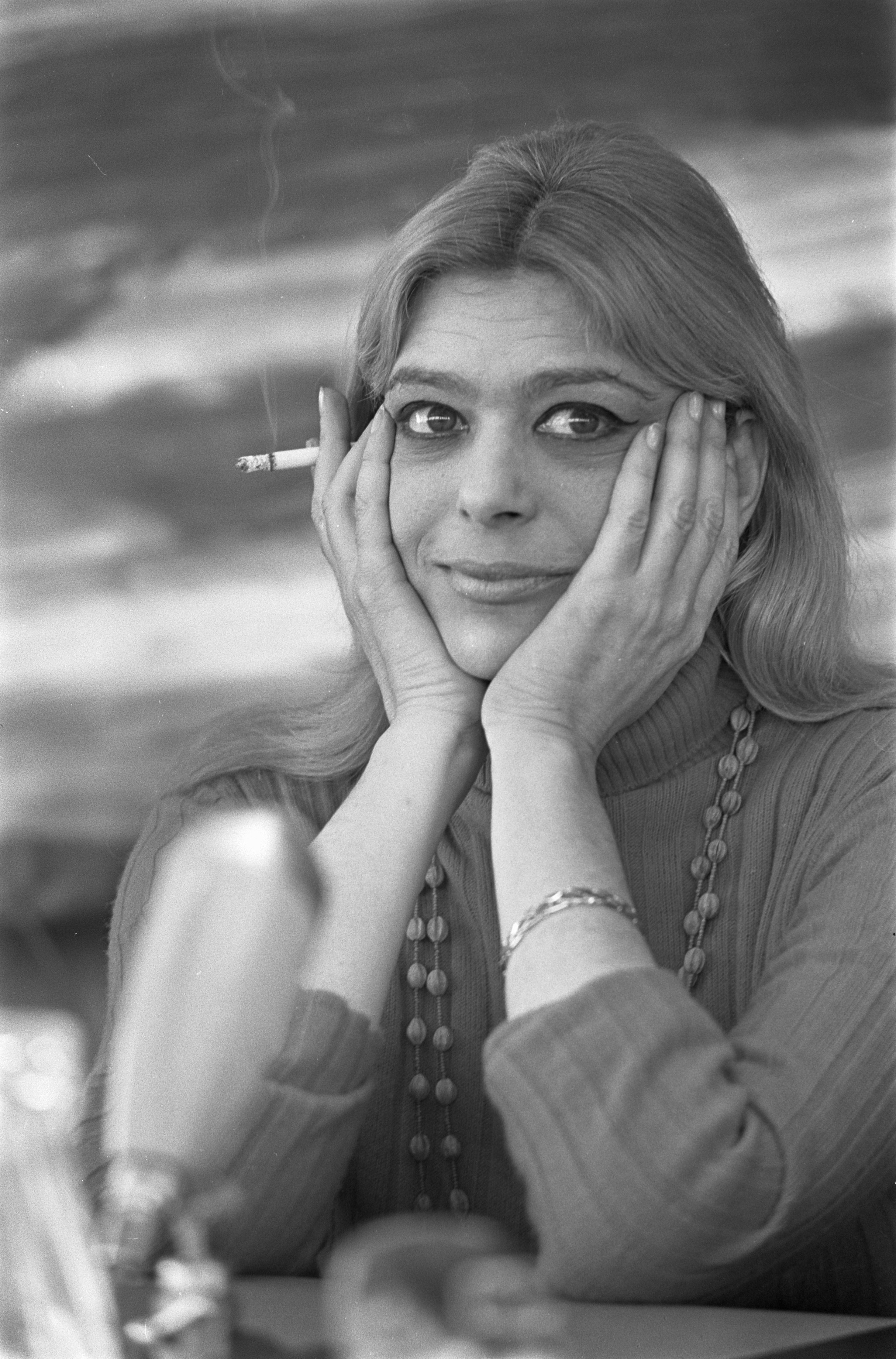 Collectie / Archief : Fotocollectie Anefo Reportage / Serie : [ onbekend ] Beschrijving : Aankomst Melina Mercouri . Melina Mercouri Datum : 14 mei 1968 Trefwoorden : aankomsten Persoonsnaam : Mercouri, Melina Fotograaf : Nijs, Jac. de / Anefo Auteursrechthebbende : Nationaal Archief Materiaalsoort : Negatief (zwart/wit) Nummer archiefinventaris : bekijk toegang 2.24.01.05 Bestanddeelnummer : 921-3506